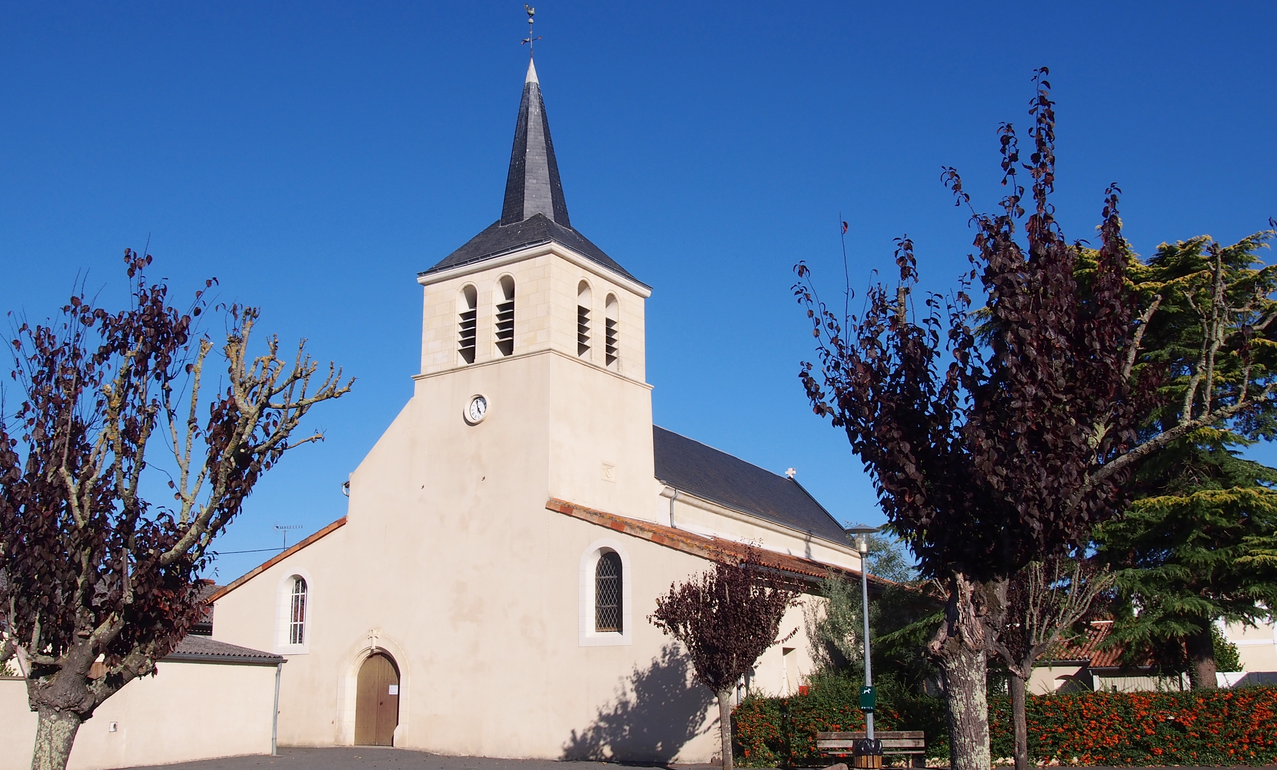 Argenton-l'Église (Nouvelle-Aquitaine, France). L'église Saint-Hilaire.